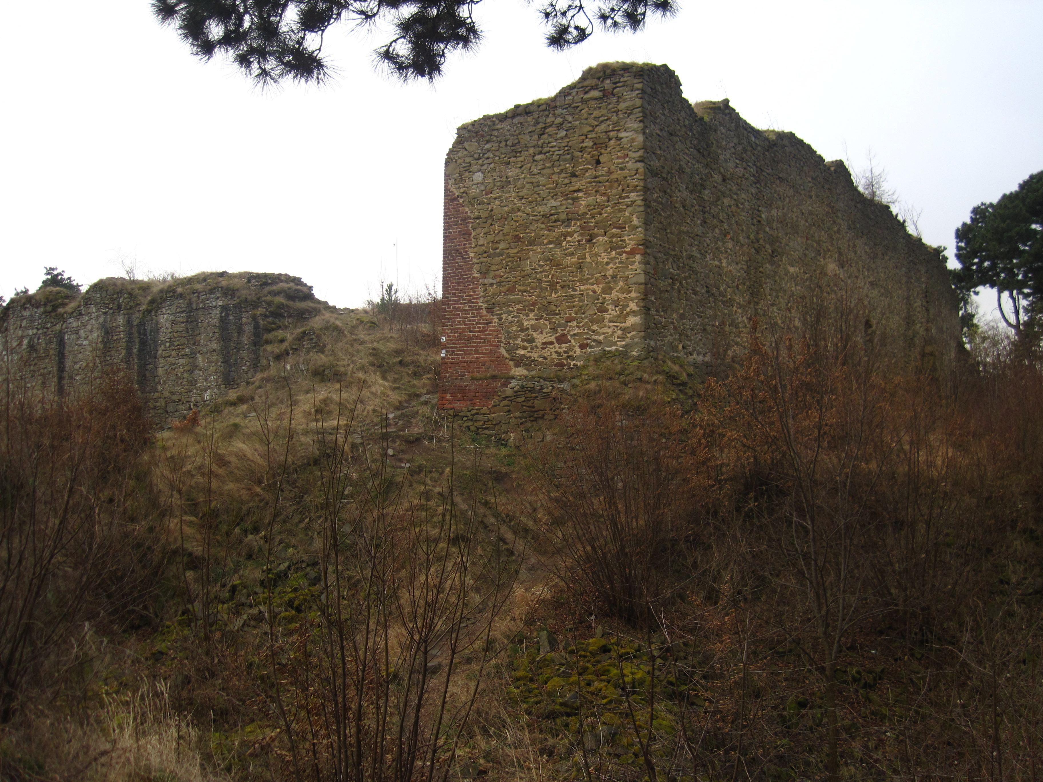 Hrad Cvilín, kopec 423 m n. m., asi 1,5 km jihovýchodně od poutního areálu a rozhledny, Pod Cvilínem, Krnov.